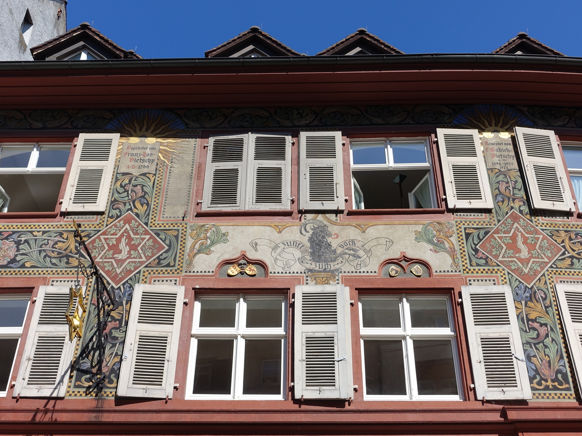 Franz Josef Dietschy (1770-1882) Bierbrauer, Gründer der Bierbrauerei Salmen, Salmenbräu Marktgasse 34 in Rheinfelden, Aargau